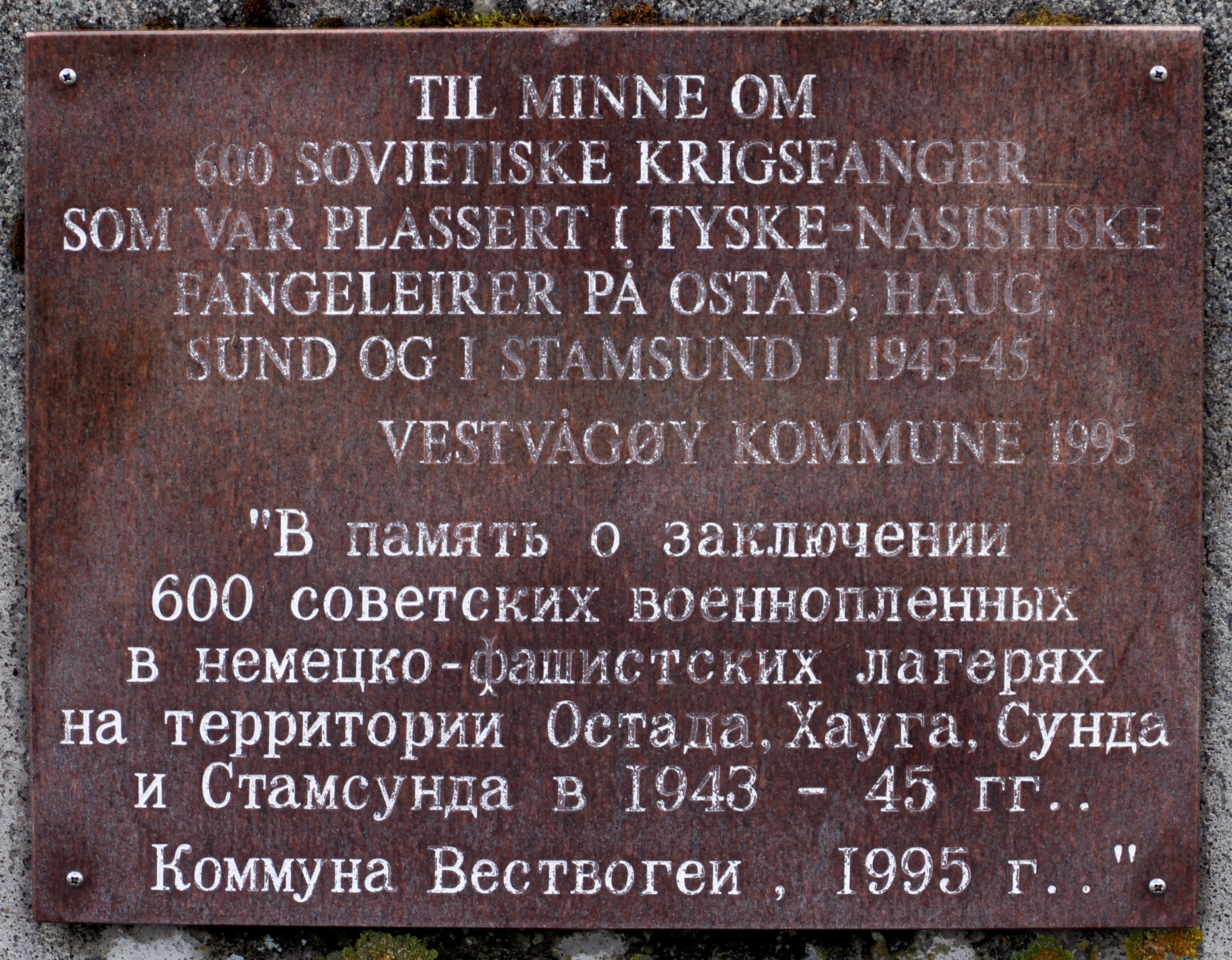 Kirche in Borg in Norwegen